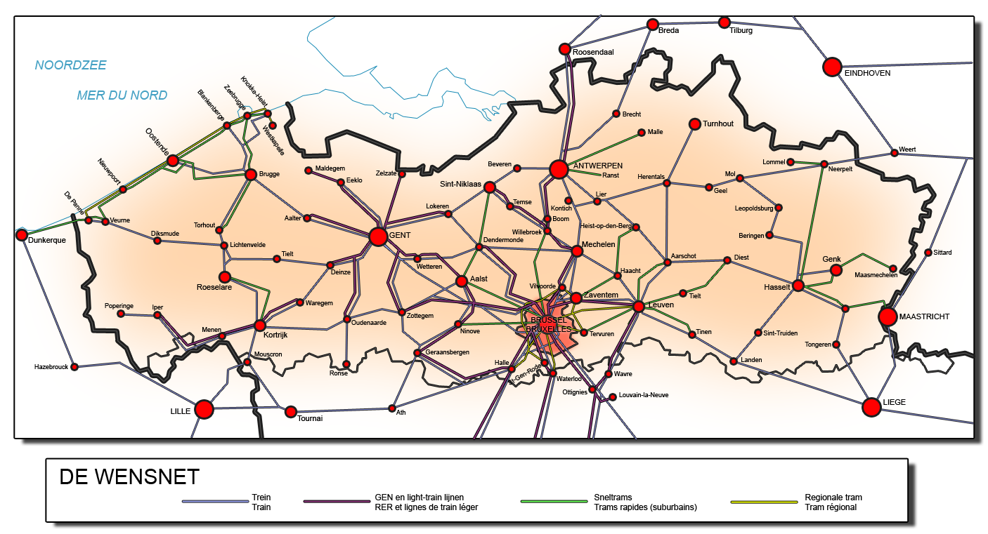 Le Wensnet (en Français le plan souhaité) est le plan de développement global des transports en commun en Flandres. Il est le résultat de l'étude du gouvernement flamand mobiliteitsvisie 2020 qui émet un certains nombre de pistes pour solutionner les problèmes de mobilités en Flandres et entre Bruxelles et sa périphérie en Brabant flamand.